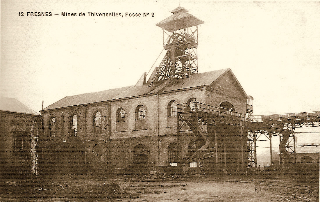 La Fosse Soult n° 2 de la Compagnie des mines de Thivencelle était un charbonnage constitué d'un seul puits situé à Fresnes-sur-Escaut, Nord, Nord-Pas-de-Calais, France.